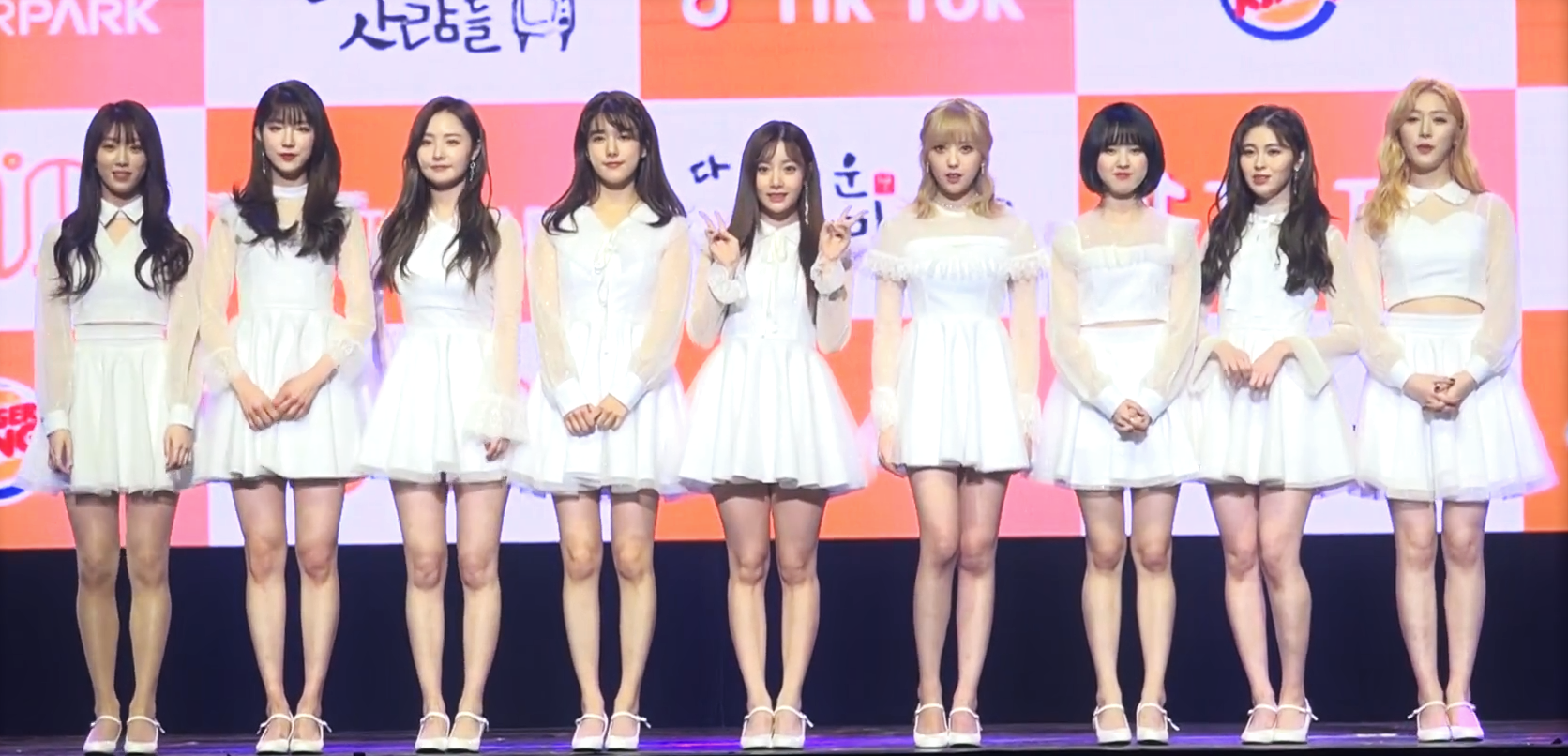 180303 유니티 팬미팅